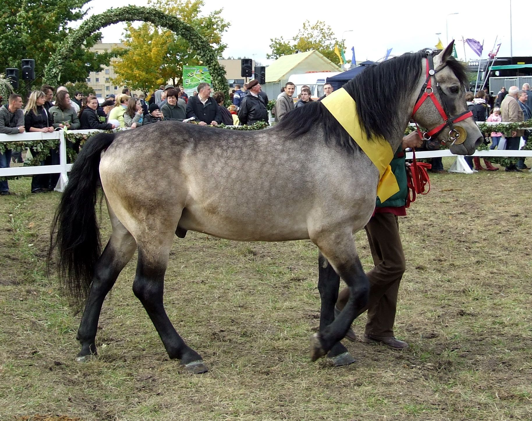 Žemaitukas. Lithuania.